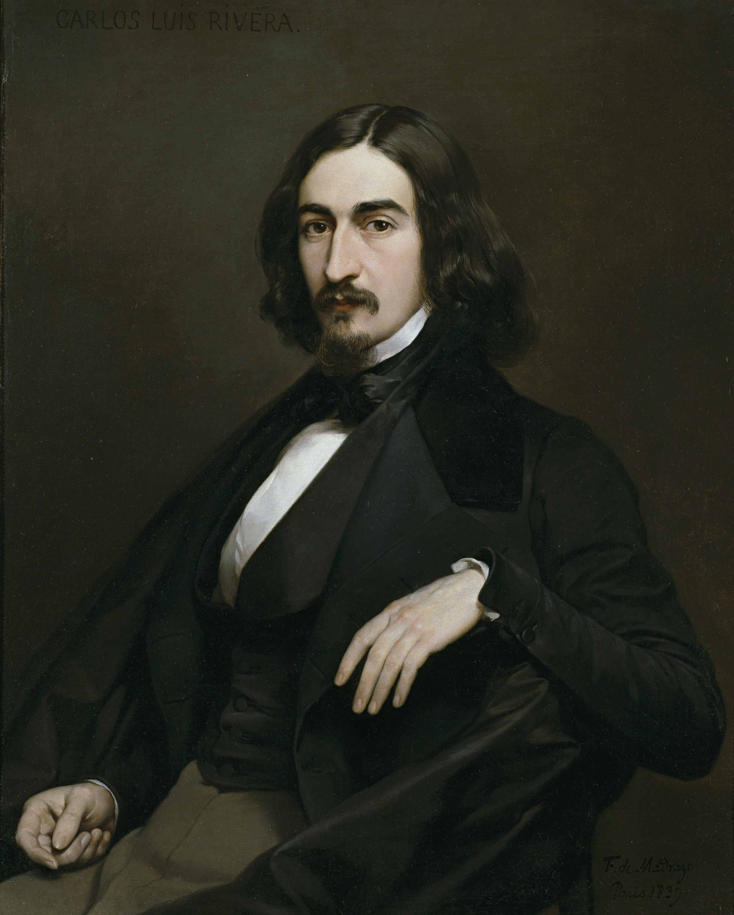 Retrato del pintor español Carlos Luis de Ribera y Fieve (1815-1891).